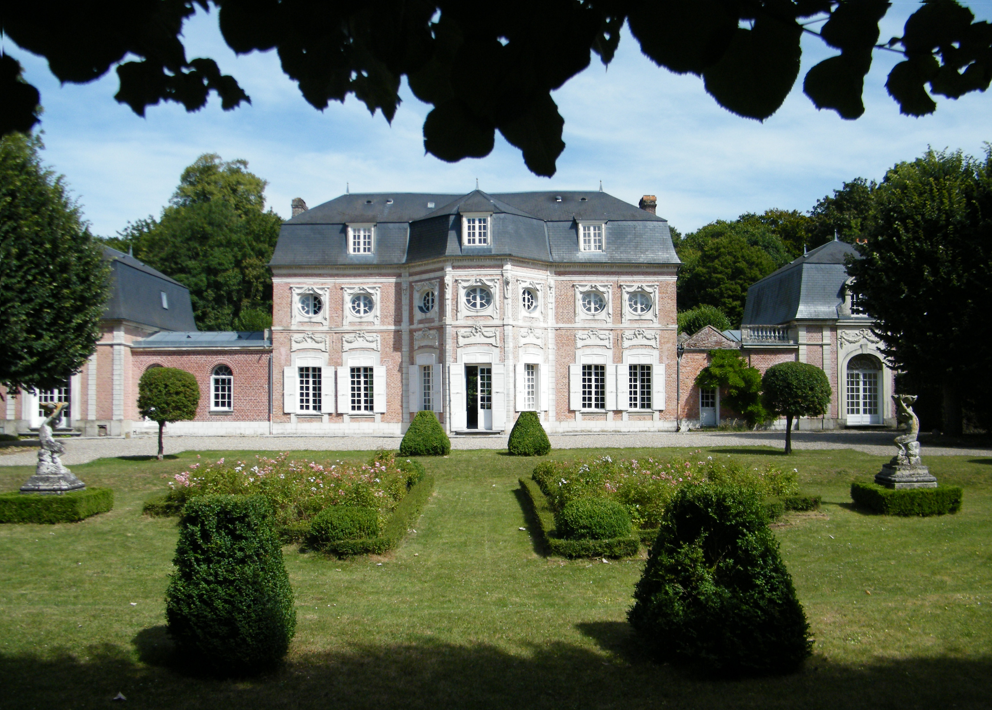 Abbeville, Somme, Fr, Château de Bagatelle, façade avant, côté rue du faubourg Saint-Gilles.